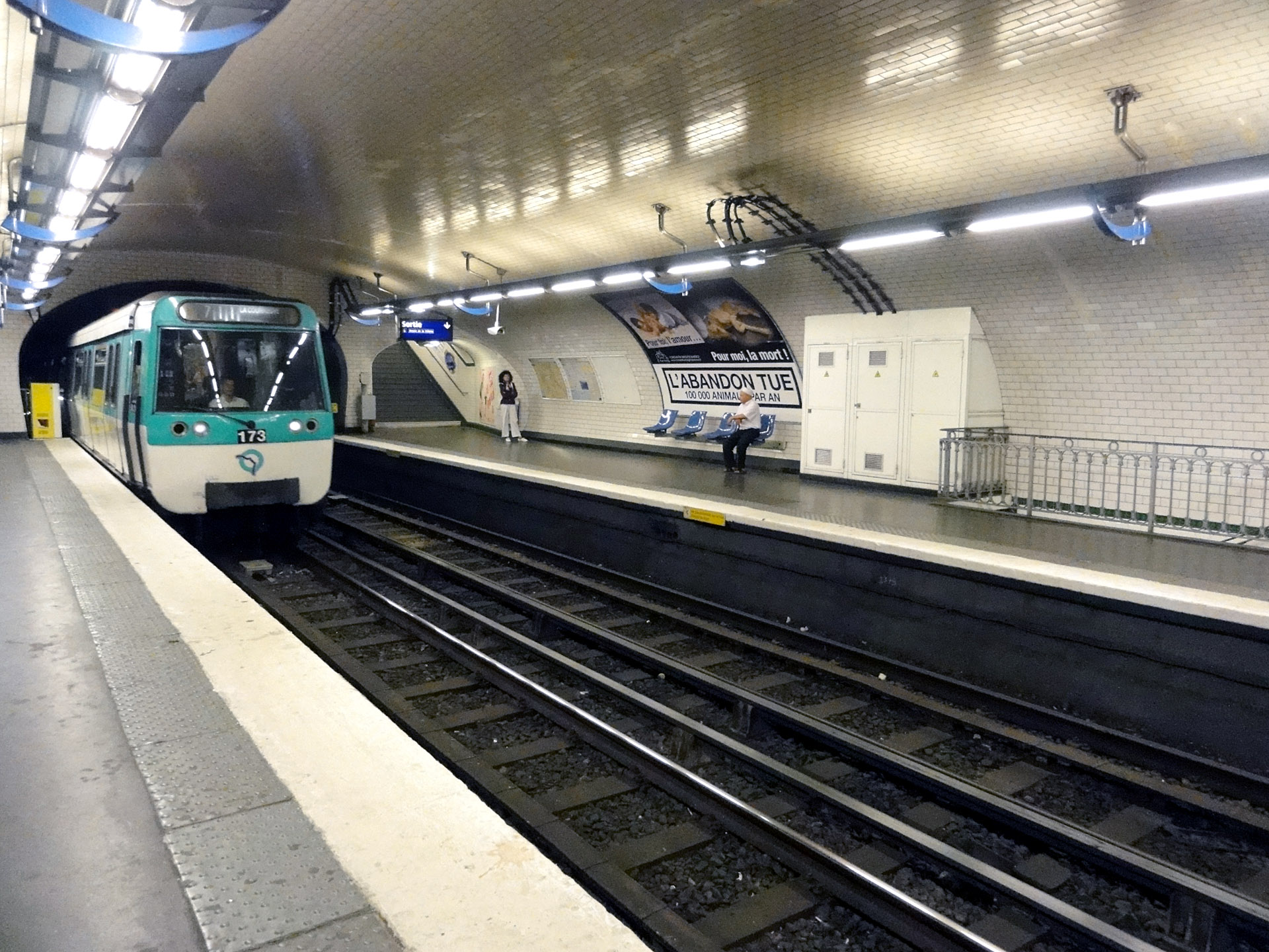 La station Stalingrad de la ligne 7 du métro de Paris, France.